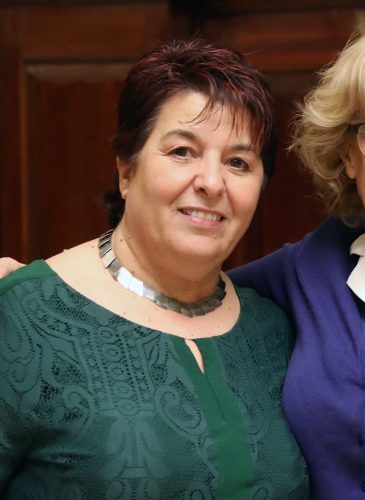 La puesta en marcha de un futuro tándem cultural Madrid-Segovia ha sido el objeto de la entrevista mantenida hoy entre las respectivas alcaldesas de ambas ciudades, Manuela Carmena y Clara Luquero, en el palacio de Cibeles. Esta colaboración pivotaría sobre dos ejes fundamentales: la cultura y el patrimonio.